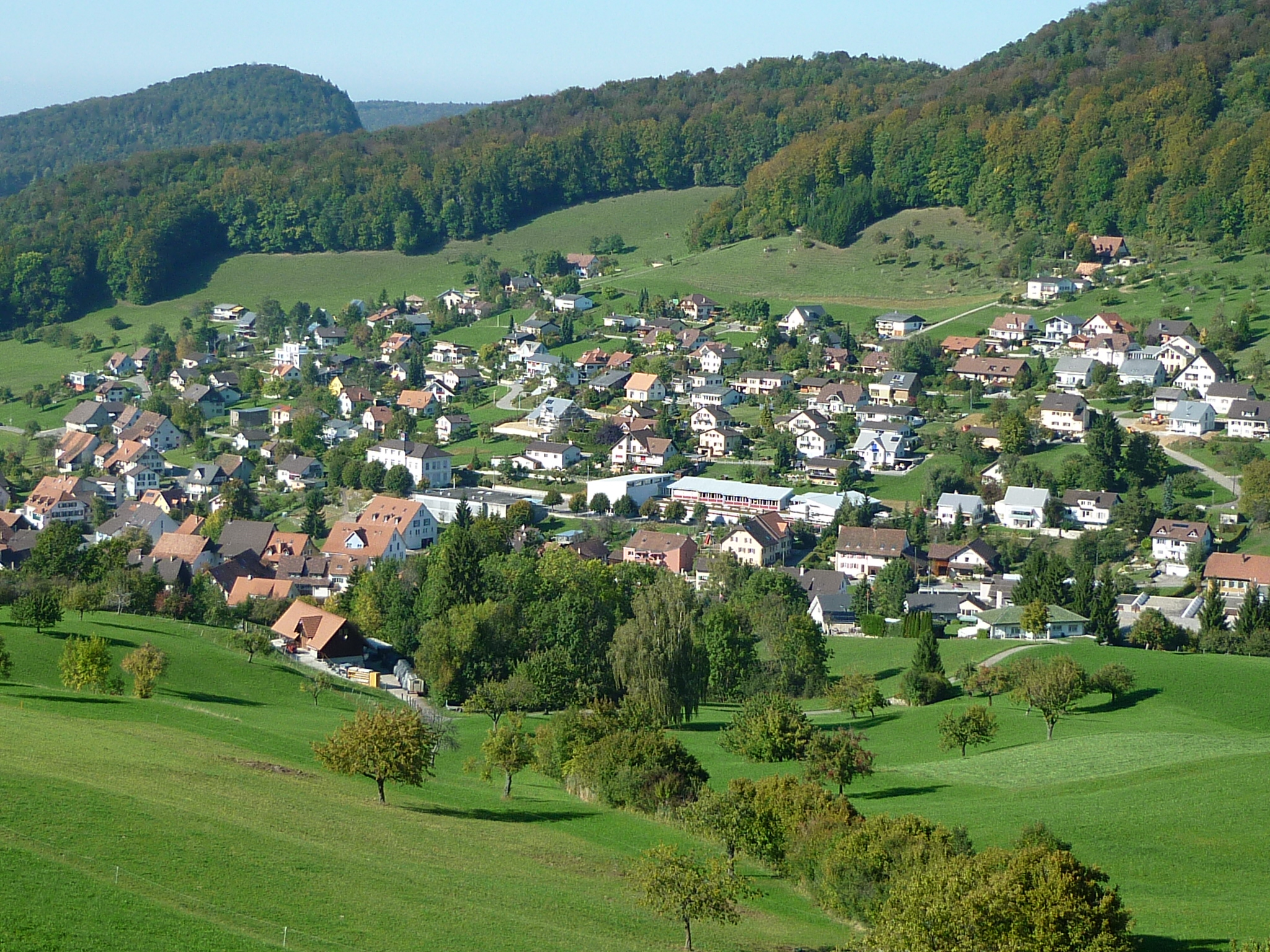 Nunningen SO, Schweiz